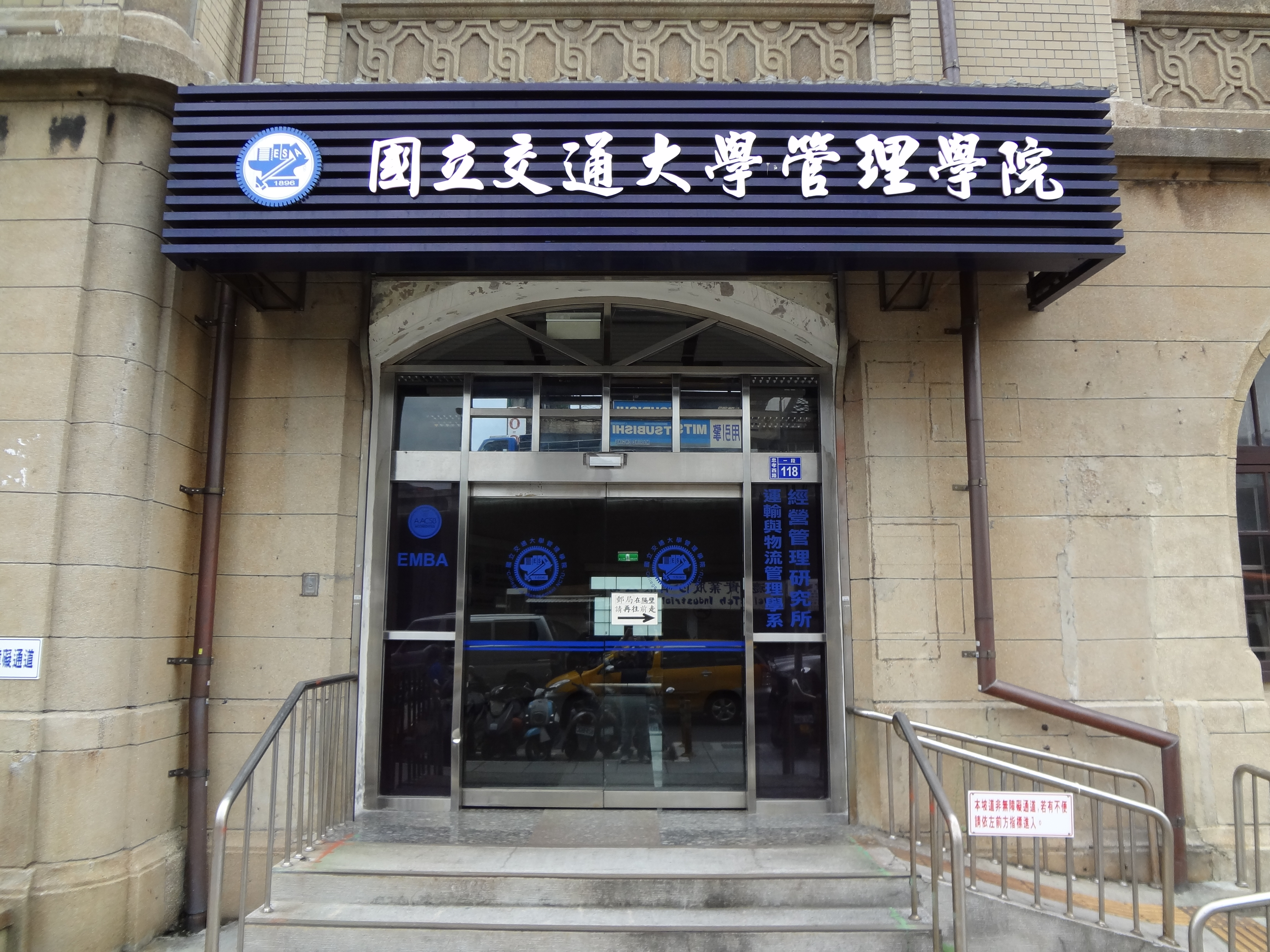 中文（台灣）: 國立交通大學臺北校區，位於臺北郵局內。